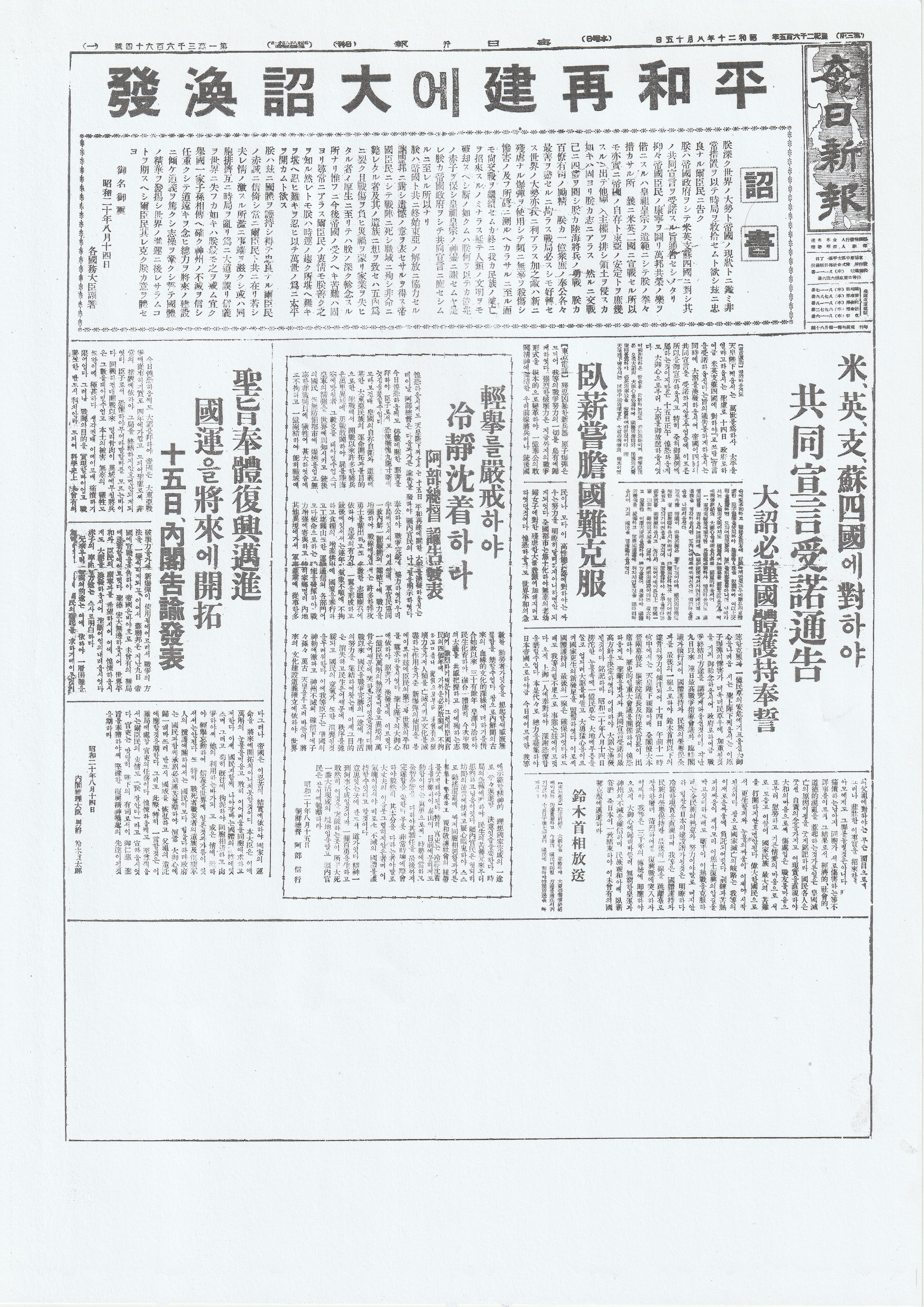 1945년 8월 15일자 매일신보('해방공간 4대신문 영인본 - 서울신문 1'에서 가져옴)